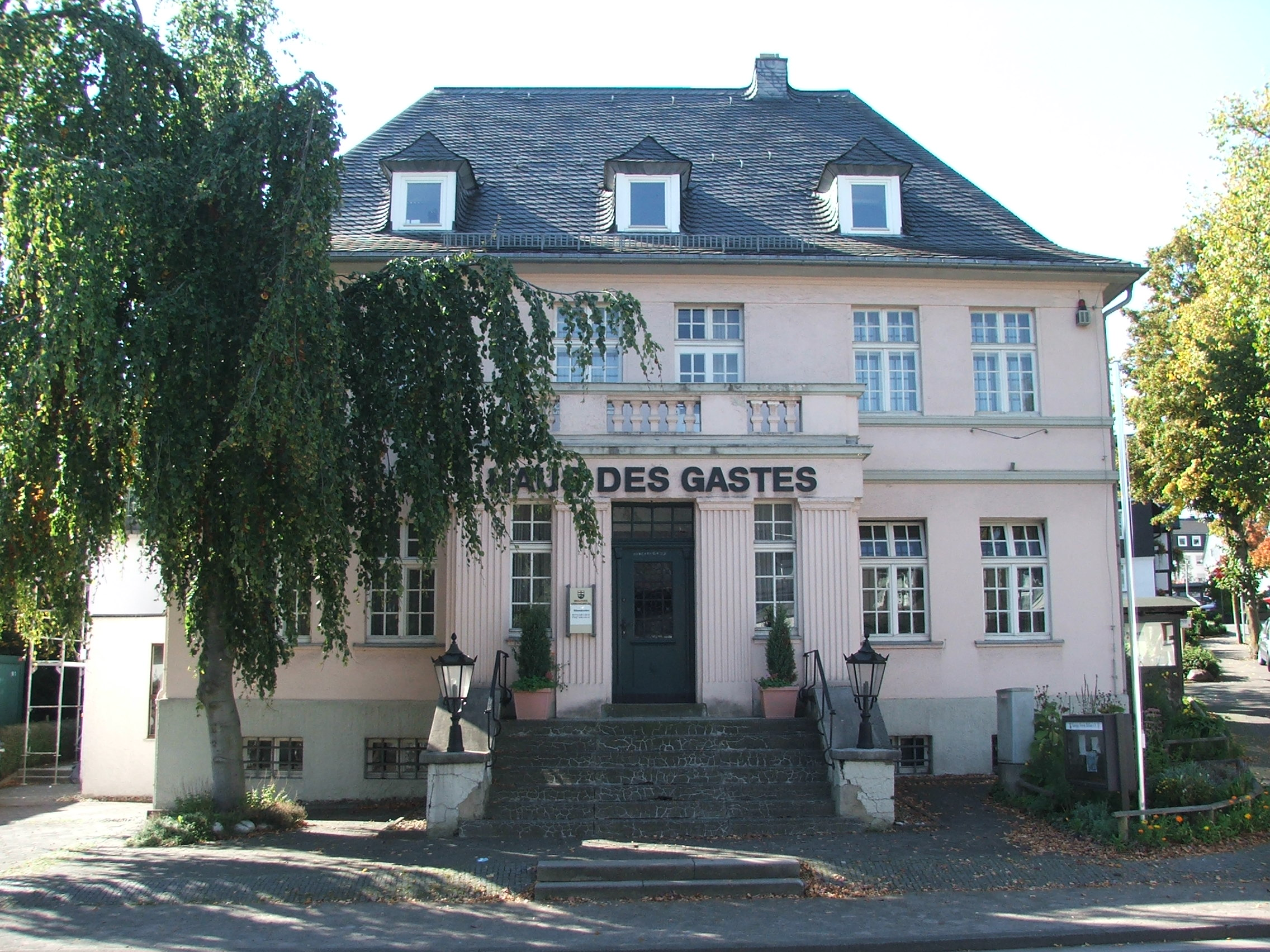 Haus des Gastes, Ofen-Museum, Brilon